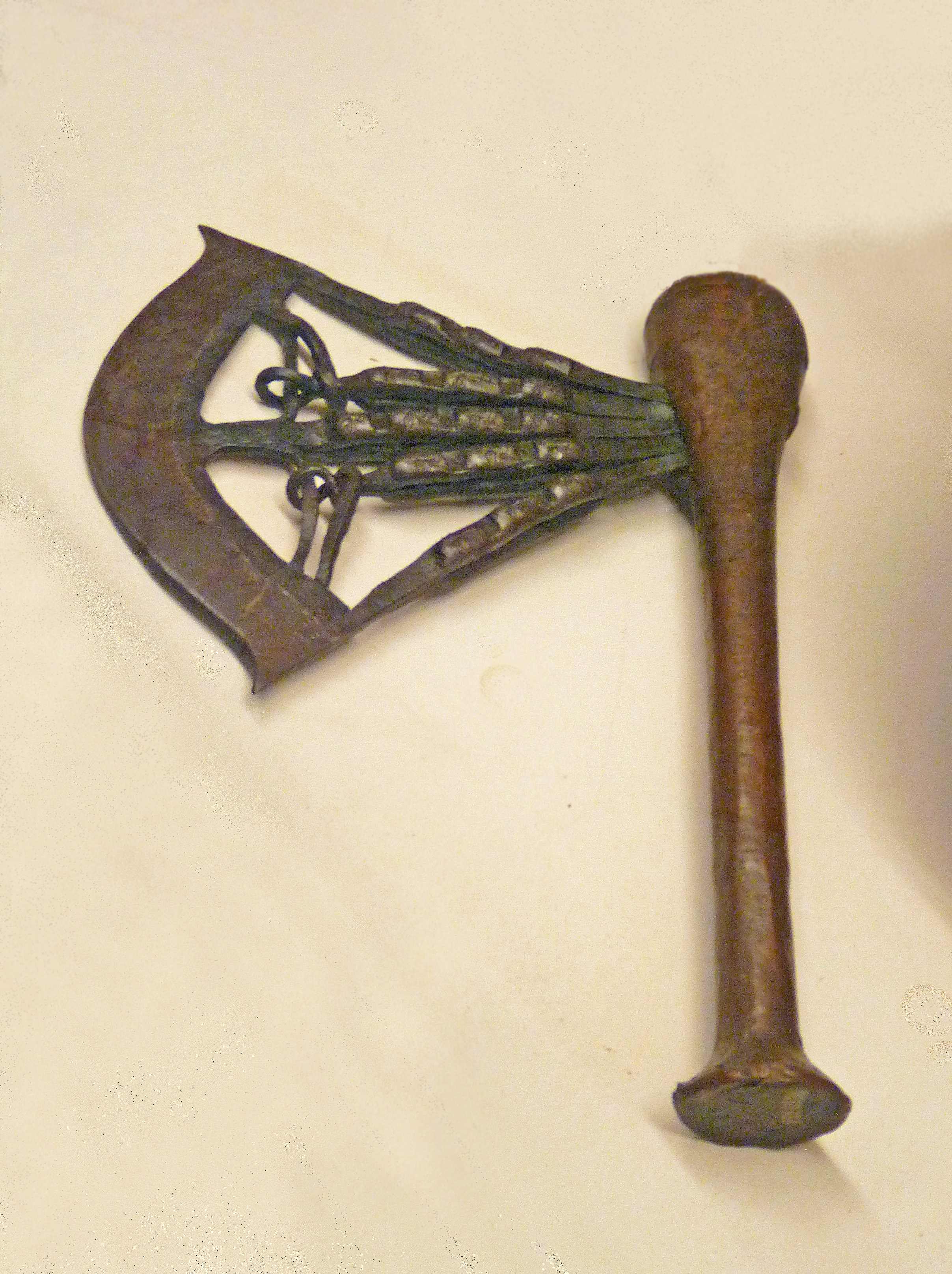 Songye : hache d'apparat. Musée royal de l'Afrique centrale